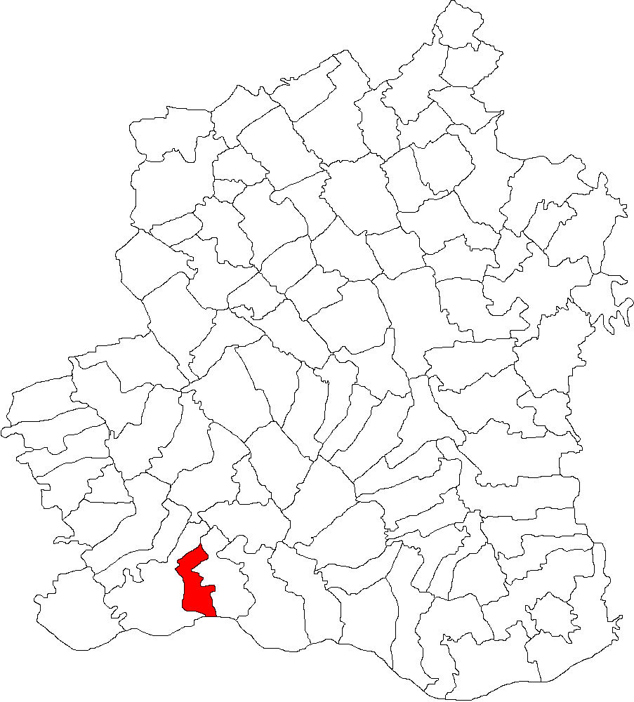 Categorie:Hărţi ale judeţului Teleorman